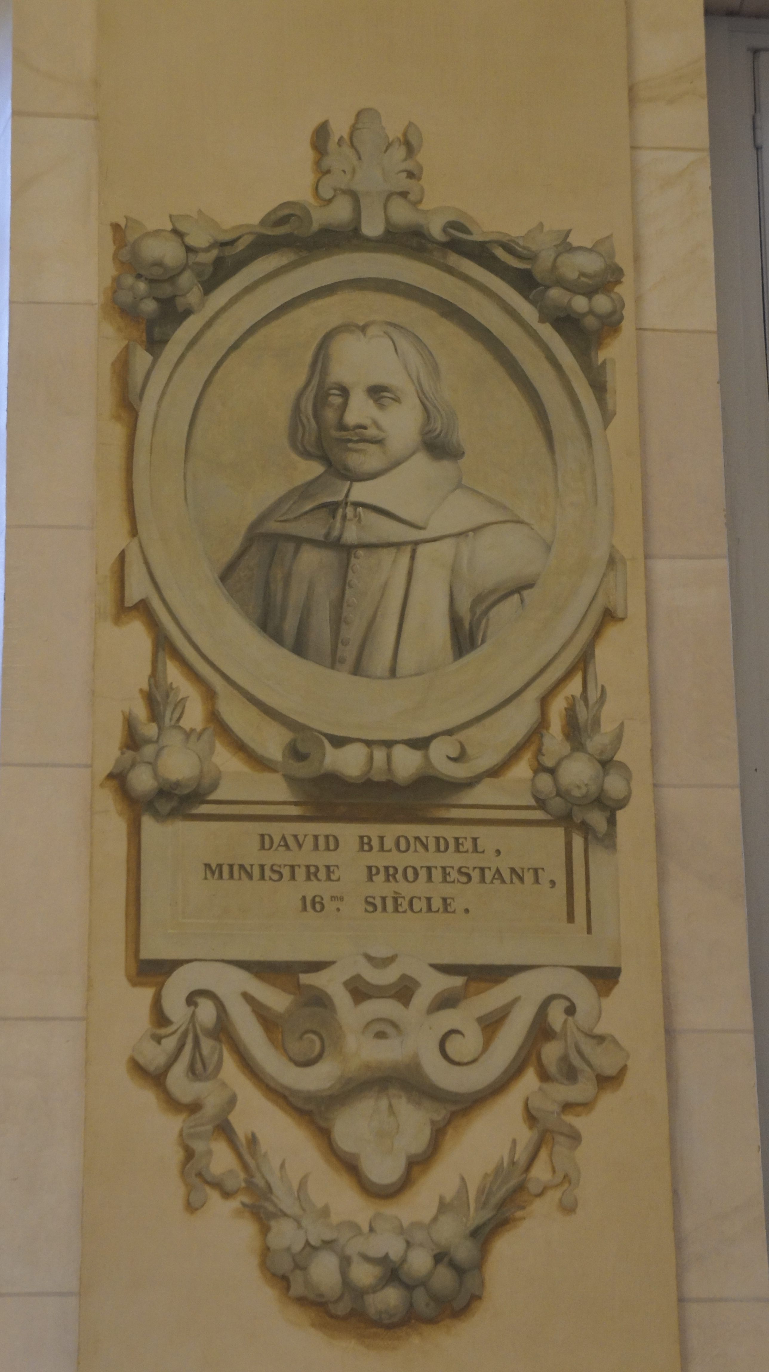 grisaille se trouvant à la mairie de Châlons.